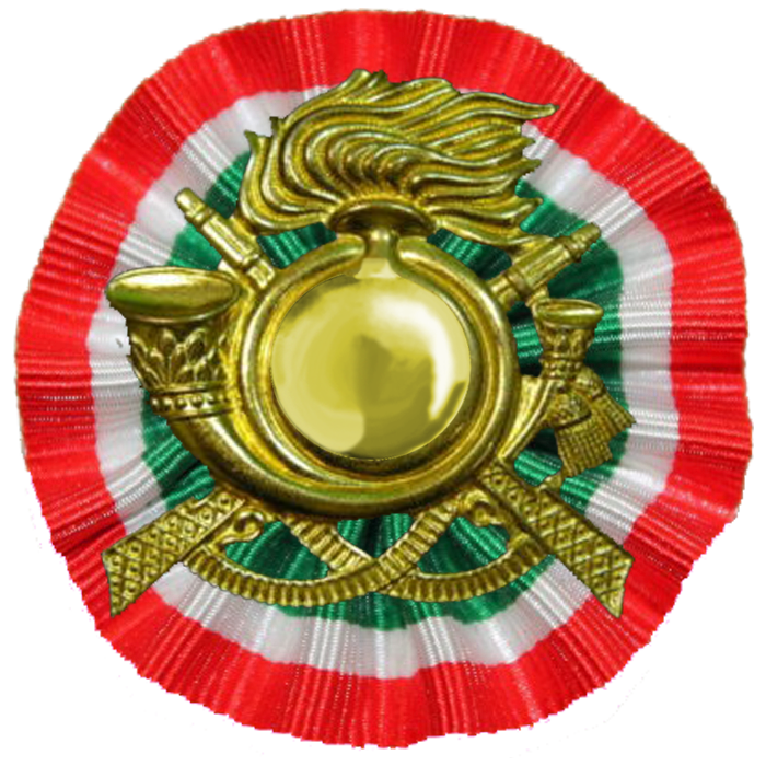 Fregio per cappello piumato da bersagliere 1975. L'assenza del numero del Reggimento indica il personale fuori corpo.